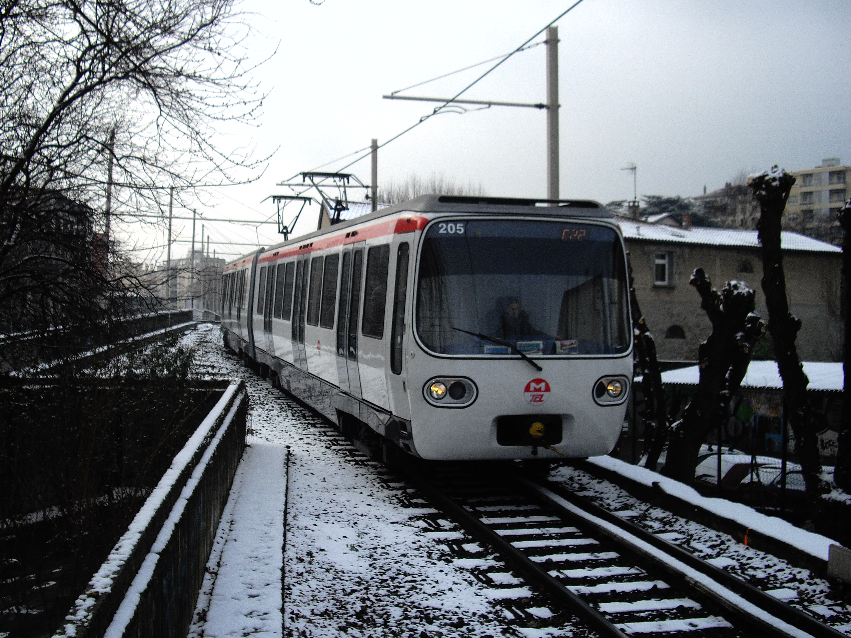 MCL80 sur la ligne C du métro lyonnais, à Cuire.